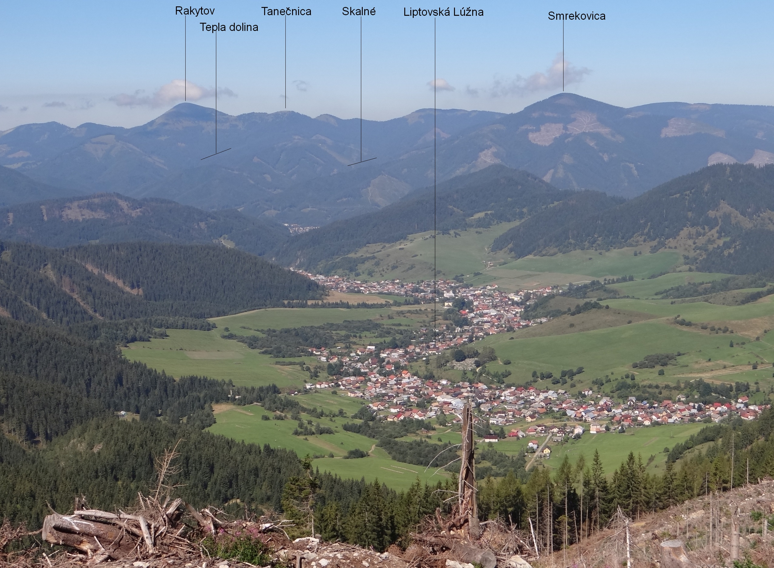 Liptovská Lúžna, Lúžňanská kotlina, Veľká Fatra